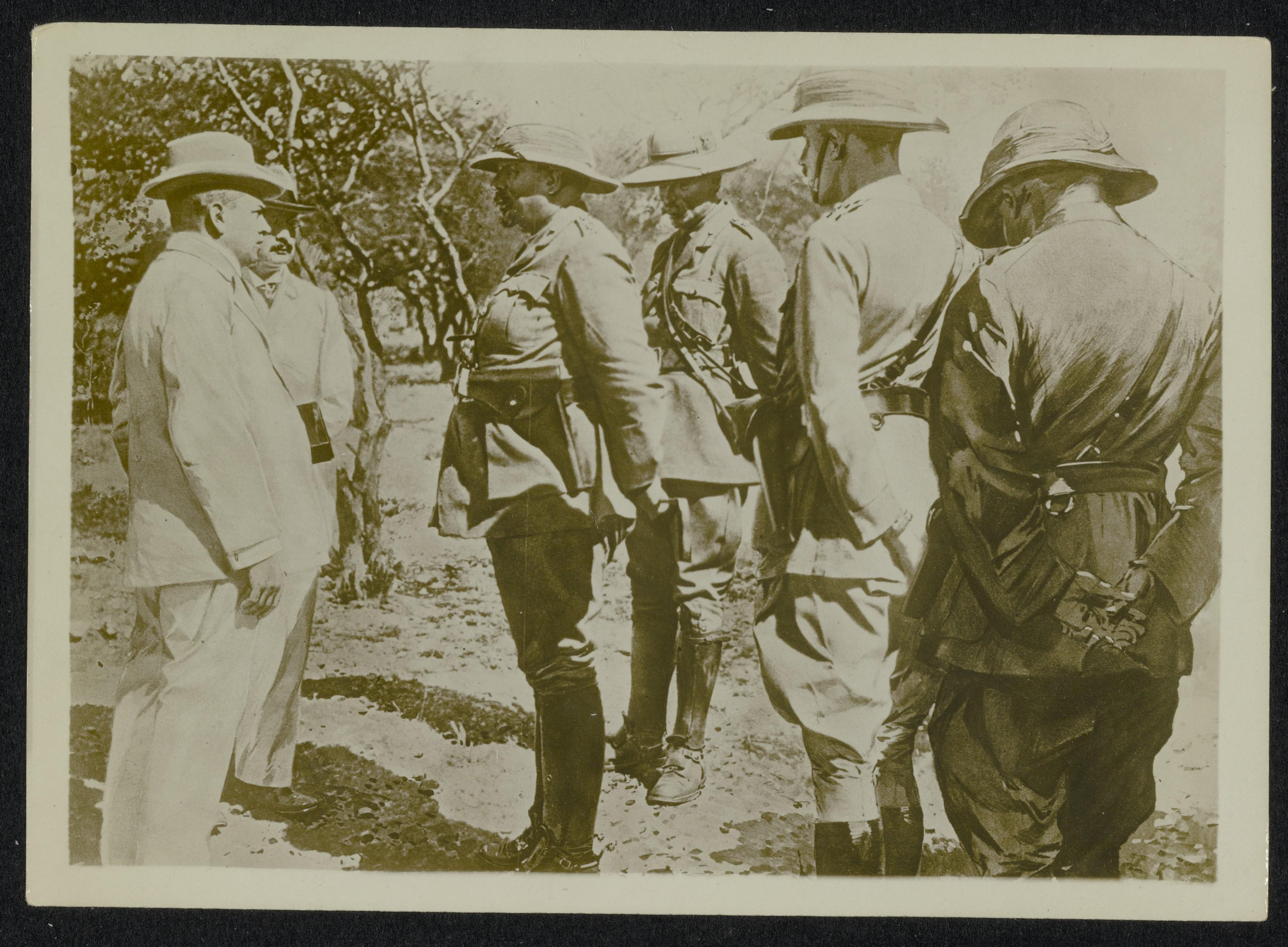 Generaals Botha, met achter hem generaal Smuts, spreekt met de burgemeester van Windhoek (Duits Zuid-West Afrika) (waarschijnlijk Peter Müller), tijdens de overgave van de plaats aan Zuid-Afrikaanse troepen